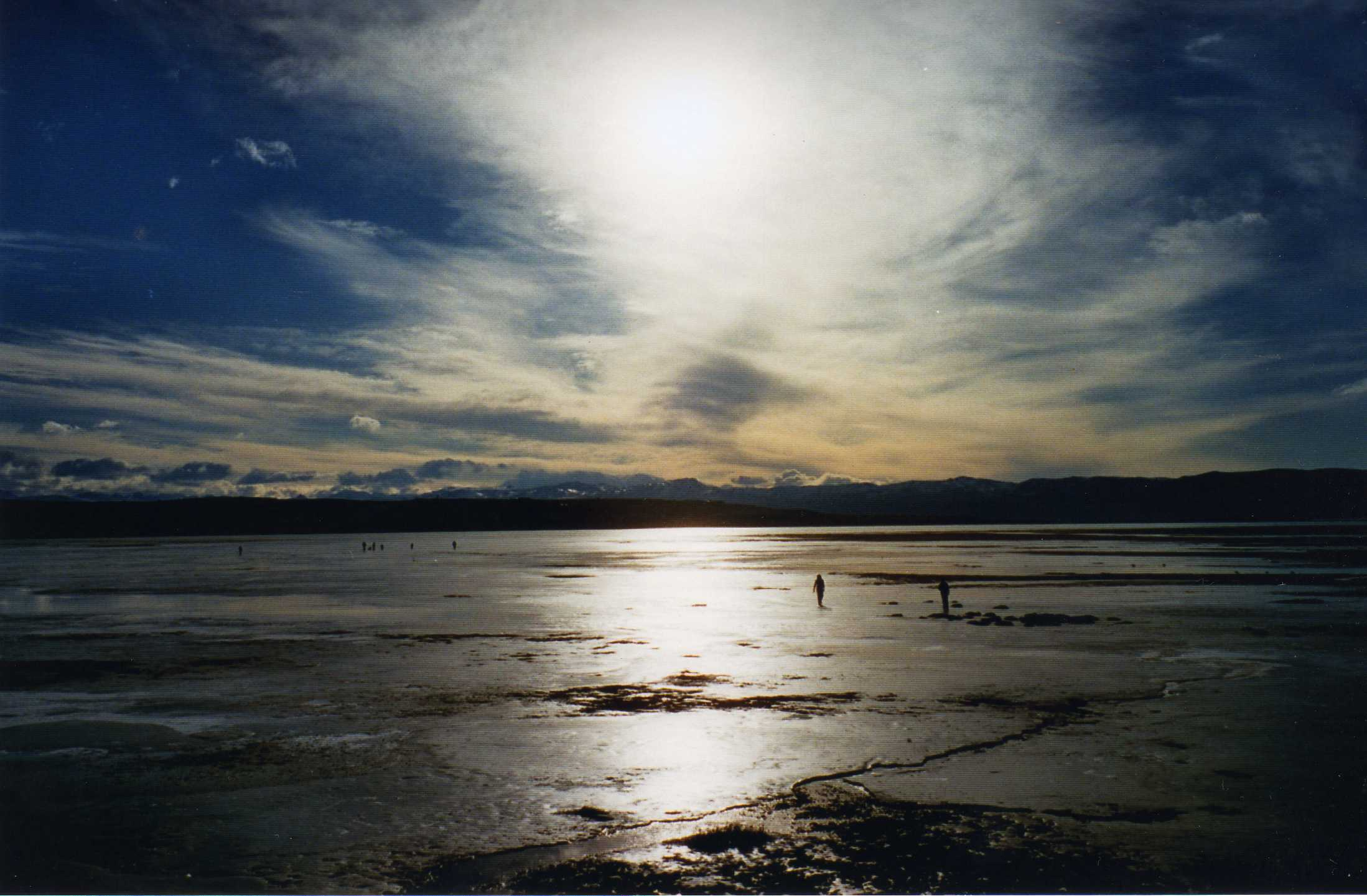 Bahía Redonda (sector congelado del lago Argentino) en El Calafate, Provincia de Santa Cruz, Argentina.